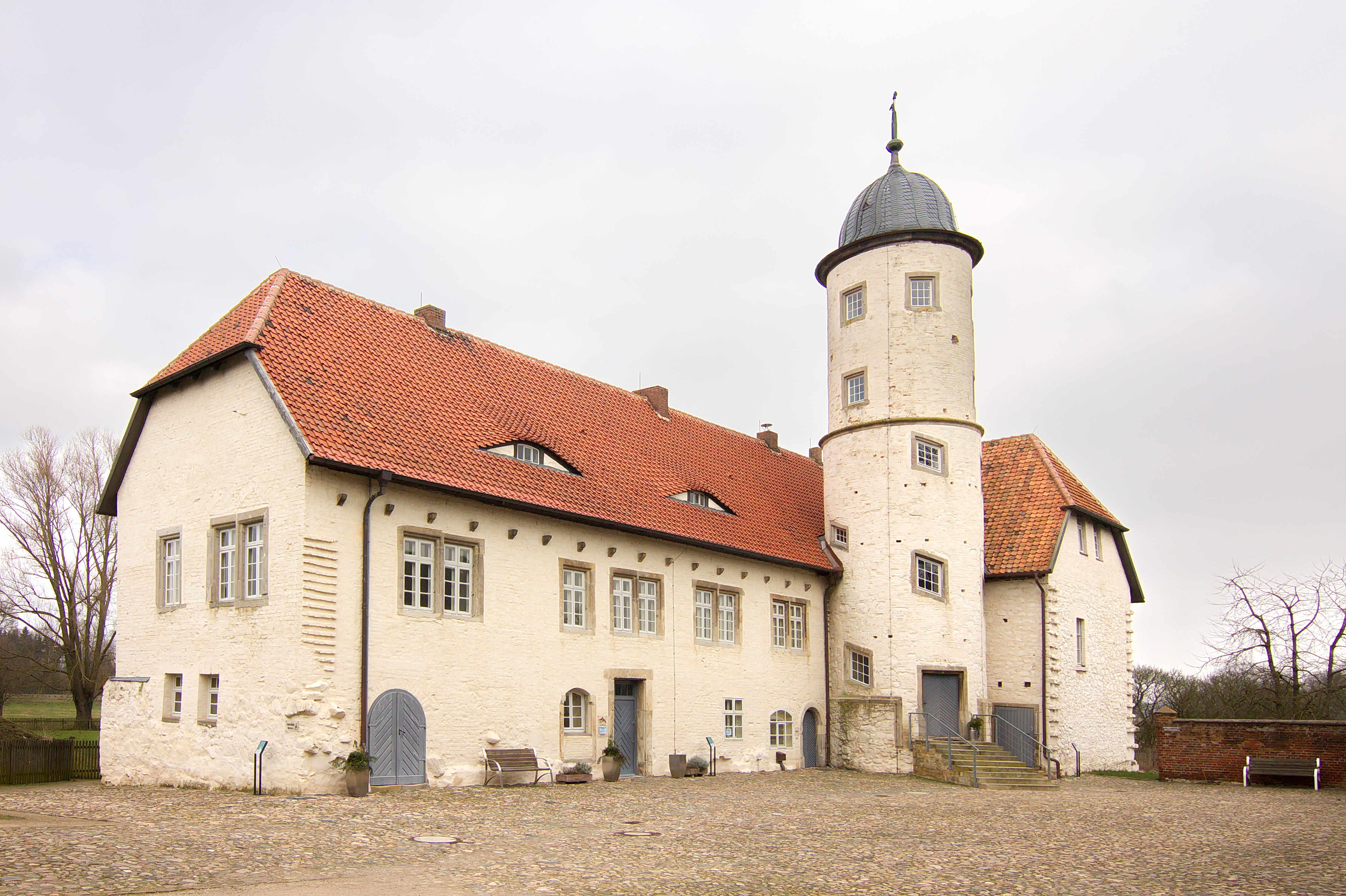 Burg Brome in Brome, Niedersachsen, Deutschland